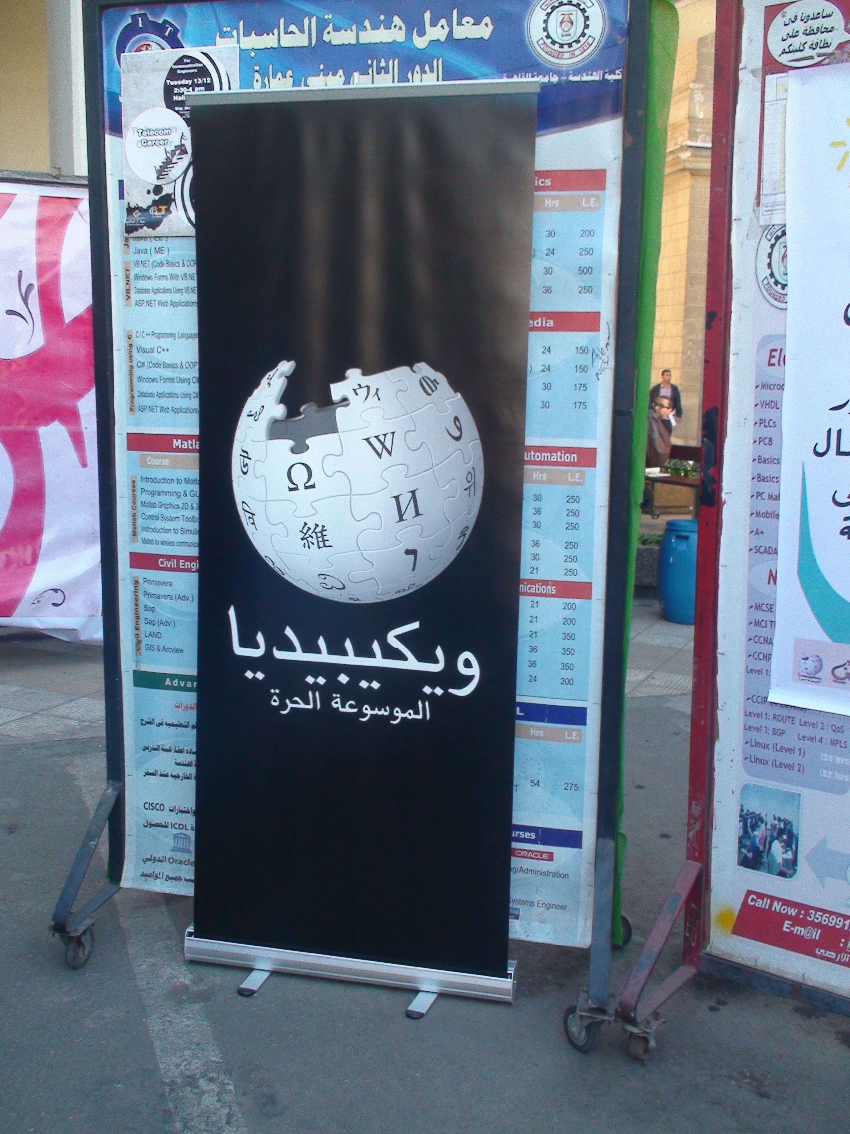 ويكيبيديا العربية تشارك في الاحتفال بيوم اللغة العربية بمشاركة طلاب كلية الهندسة، جامعة القاهرة.